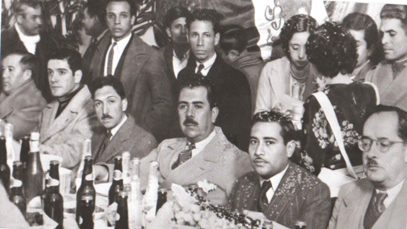 Banquete ofrecido al Presidente de México Lázaro Cárdenas por el Sindicato de Santa Rosa (hoy Ciudad Mendoza, Veracruz) en enero de 1938. Aparecen otros tres personajes que ocuparían en otro momento la presidencia de la república, en el extremo izquierdo aparece sentado el General Manuel Ávila Camacho, a su derecha de Cárdenas aparece el Lic. Miguel Alemán Valdés, gobernador de Veracruz en ese entonces. Parado detrás del general Cárdenas aparece muy joven el Lic. Gustavo Díaz Ordaz. A su izquierda de Cárdenas están sentados el líder sindical de la fábrica de Santa Rosa Eucario León López y el líder sindical y alcalde de Orizaba Martín Torres Padilla